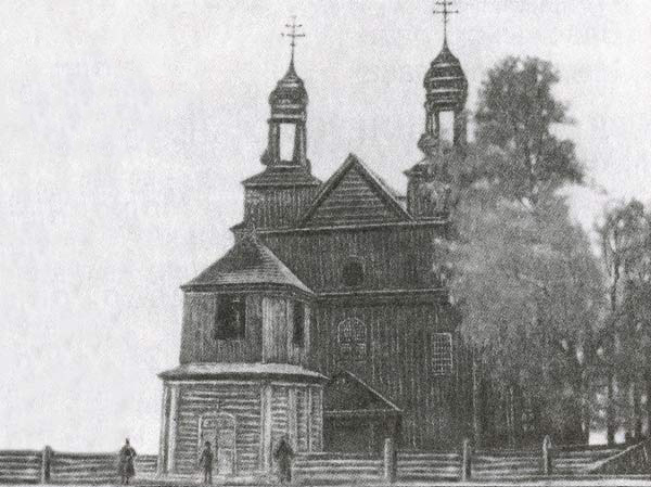 Беларуская (тарашкевіца): Казімераў (Kazimieraŭ). Царква Прачыстай Багародзіцы